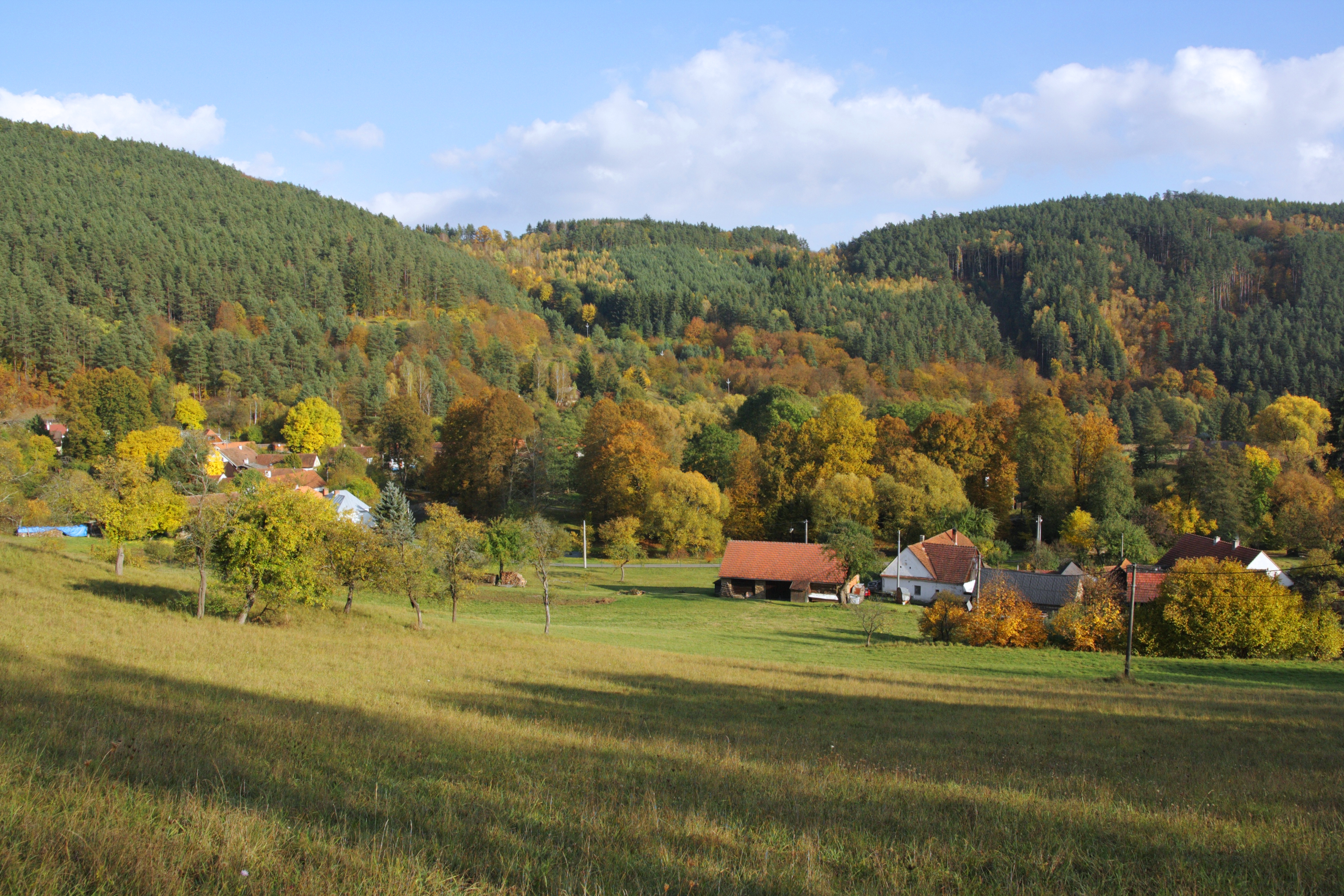 Skryje (okres Brno-venkov) - střed obce, pohled od západu